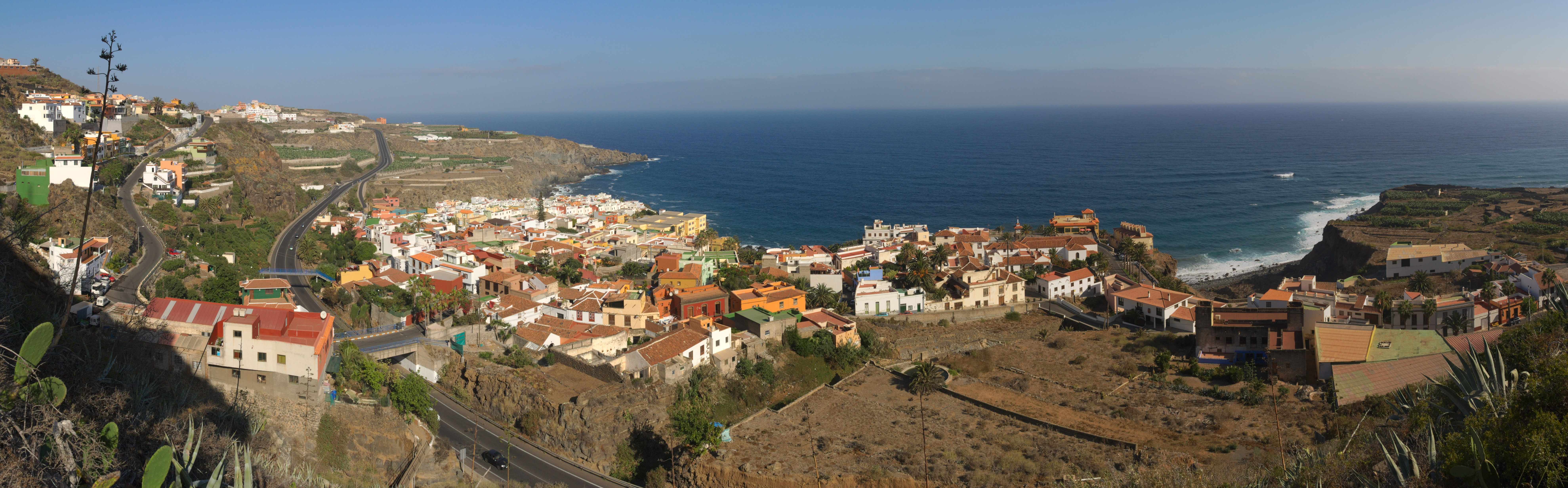 San Juan de la Rambla desde Mazapé